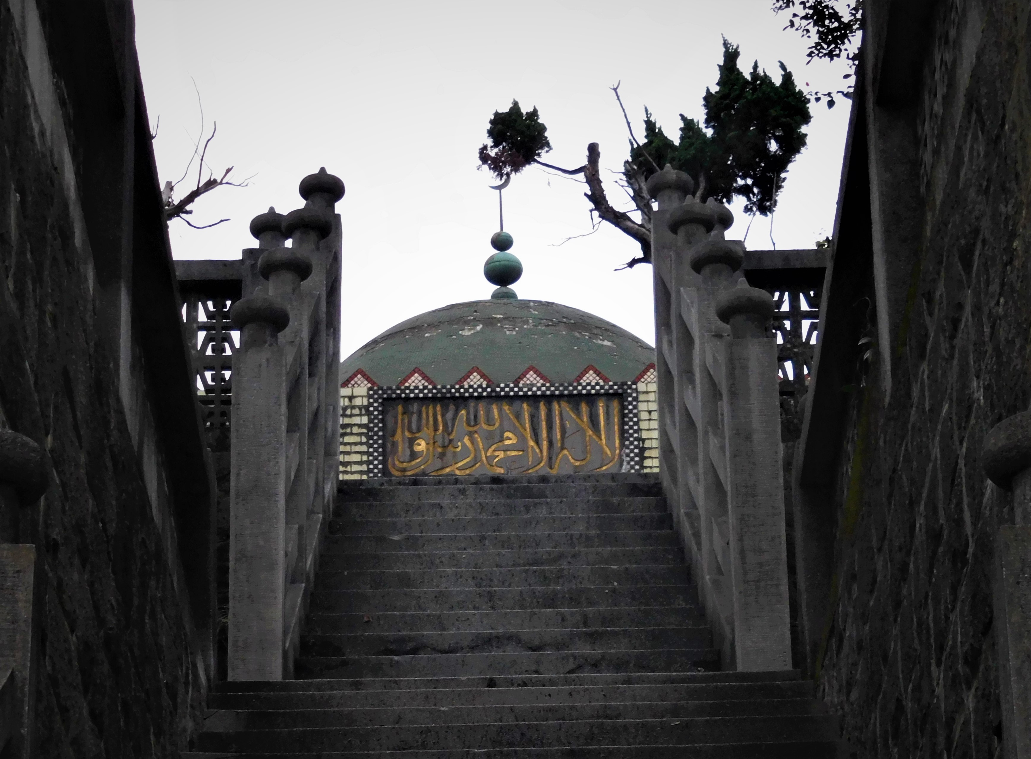 中文（台灣）: 白榕蔭堂墓園(白崇禧將軍墓)民國52年，白夫人馬佩璋女士過世，白崇禧將軍於回教公墓內闢建｢白榕蔭堂墓園｣，為白將軍留學美國學建築之兒子所設計、大陸工程公司興建，殆民國55年白崇禧將軍過世後亦安葬於此。